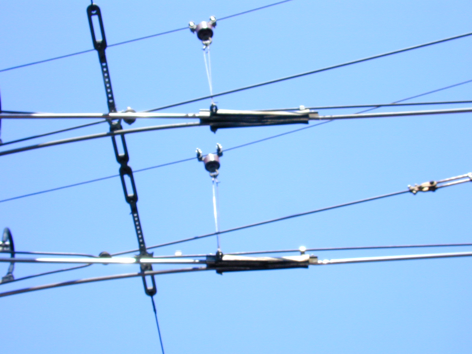 Bovenleiding afloop wissel van het Arnhems trolleybusnet.